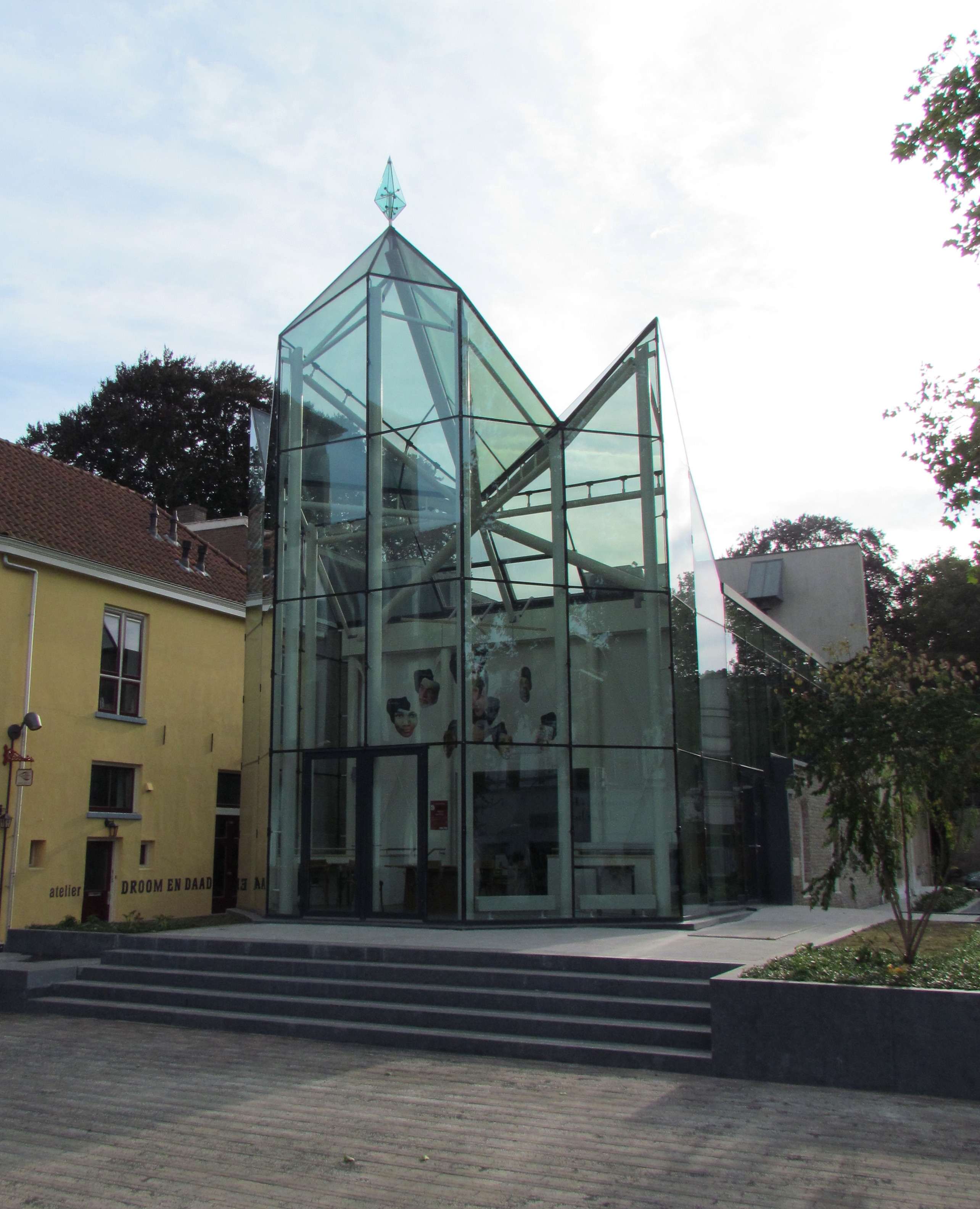 Geert Groote Huis aan het Lamme van Dieseplein in Deventer (NL), een dag voor de officiële opening